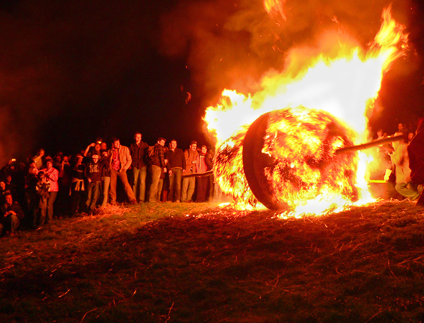 Osterräderlauf in Lüdge